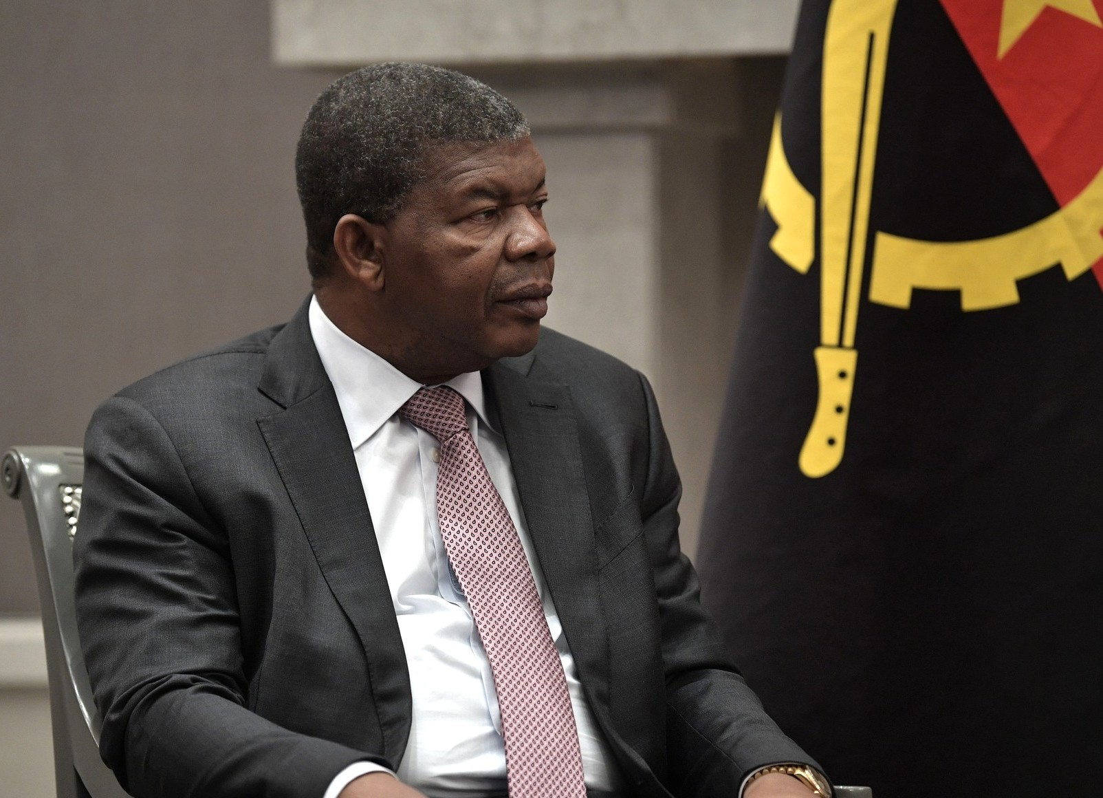 Президент Республики Ангола Жоау Лоуренсу.